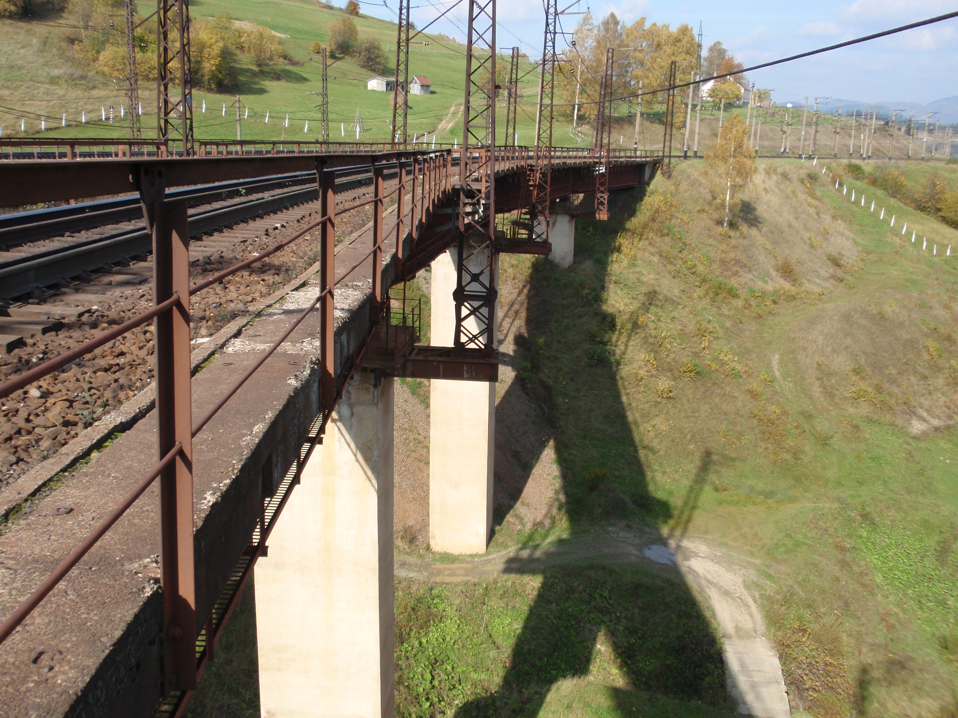 Залізничний віадук між станціями Лавочне і Опорець Львівської залізниці